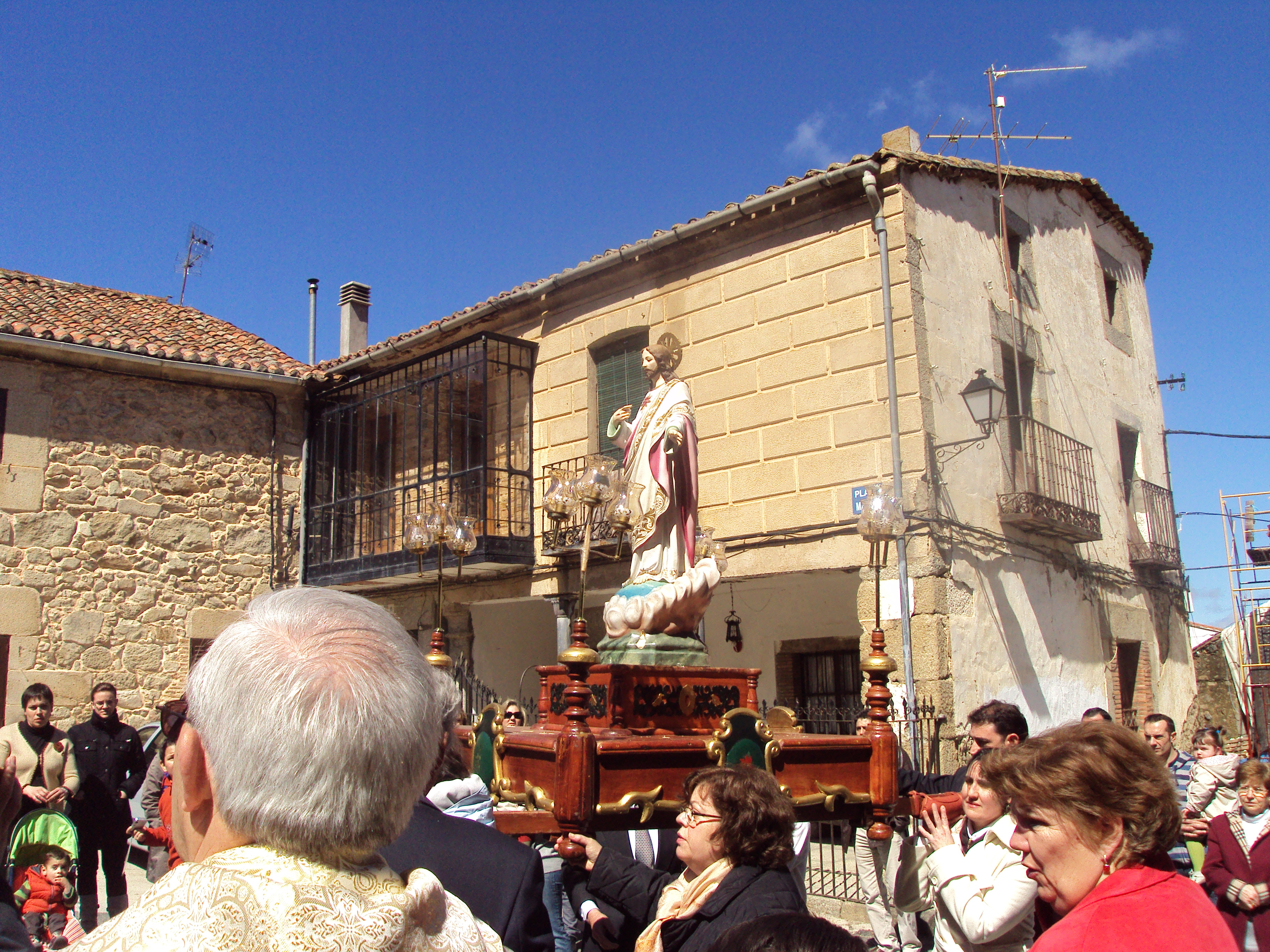 Jesús resucitado. Procesión del Domingo de Resurrección (Villafranca de la Sierra; España)